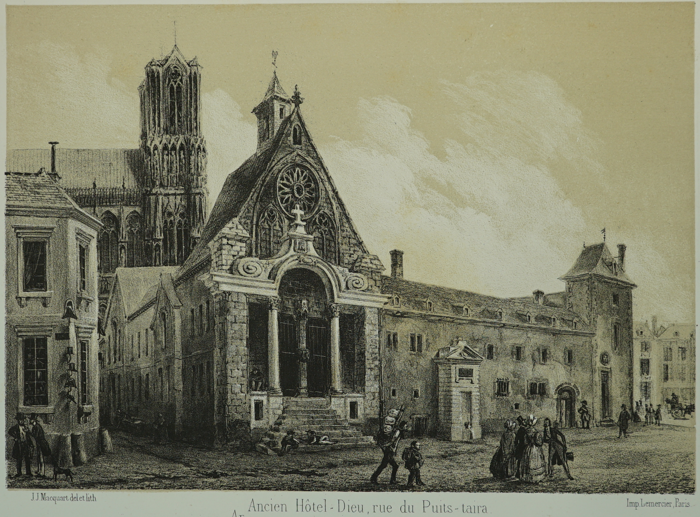 Album rémois. Collection de trente lithographies imprimées à deux teintes, dessinées et lithographiées ; ancien Hôtel-Dieu, actuellement annexe du palais de justice.